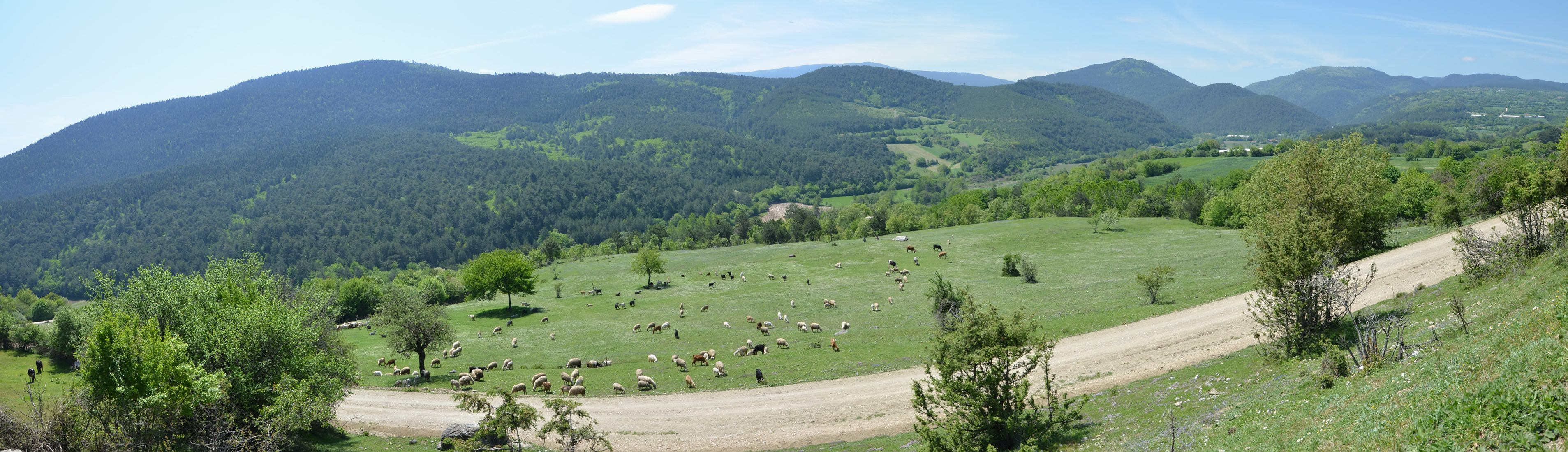 Bolu yaylalarından bir görünüm.